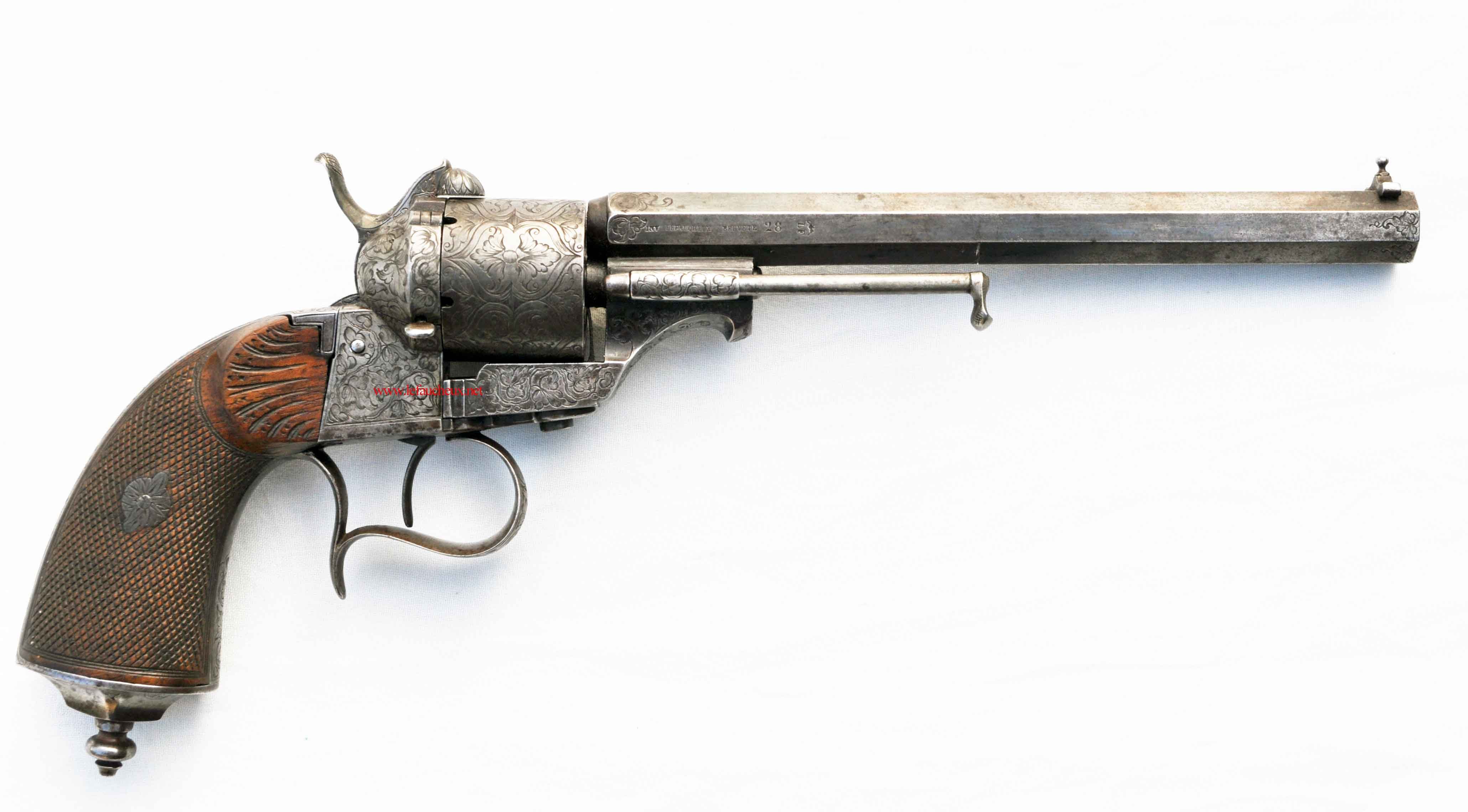 Un du tout premier revolver modèle 1854 produit par Eugène Lefaucheux, en 9 mm à broche, mécanisme en Simple Action